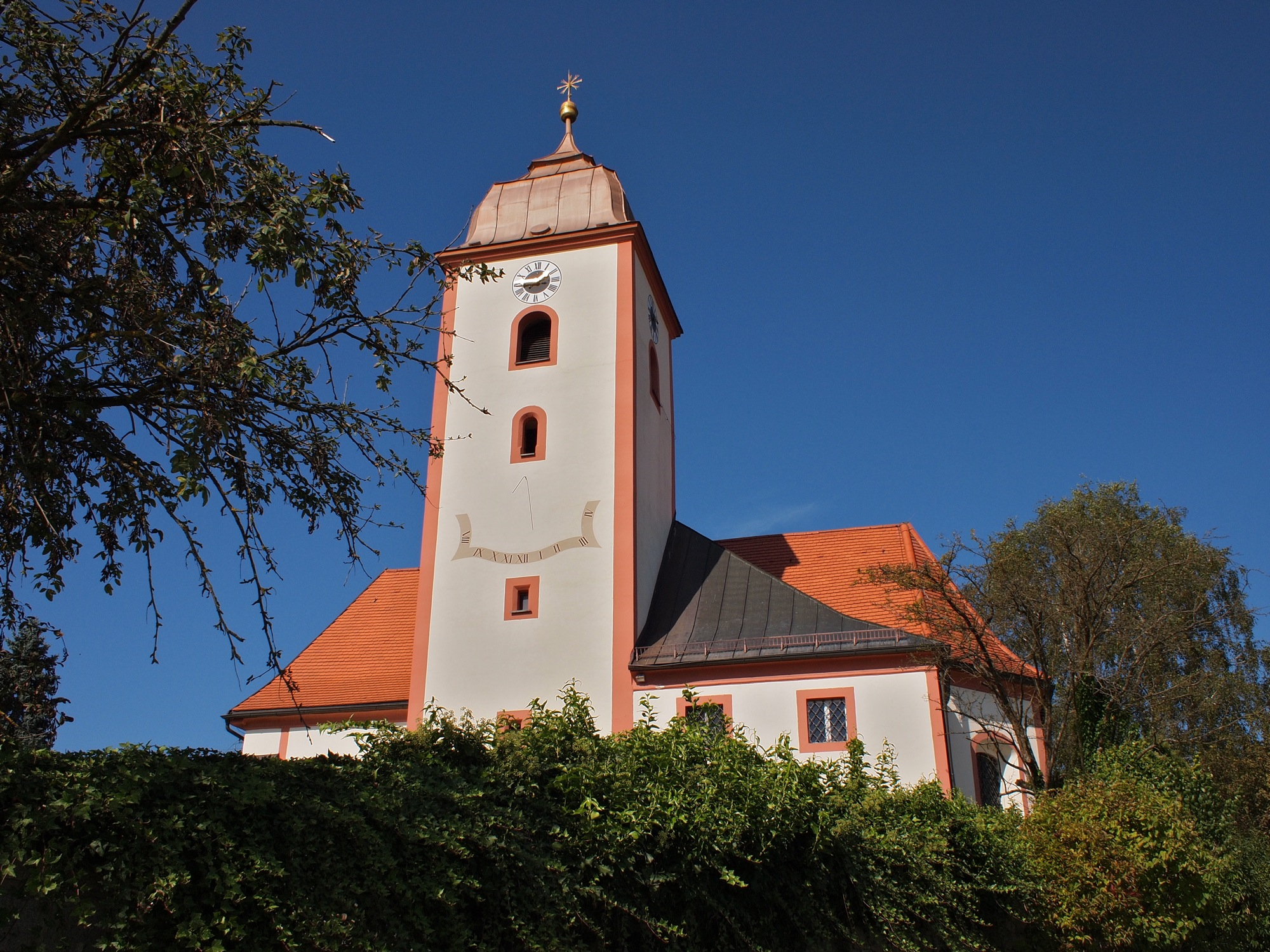 Die auf einer kleinen Anhöhe über dem Dorf Roggersing gelegene Kirche in der Gemeinde Grattersdorf in Niederbayern.